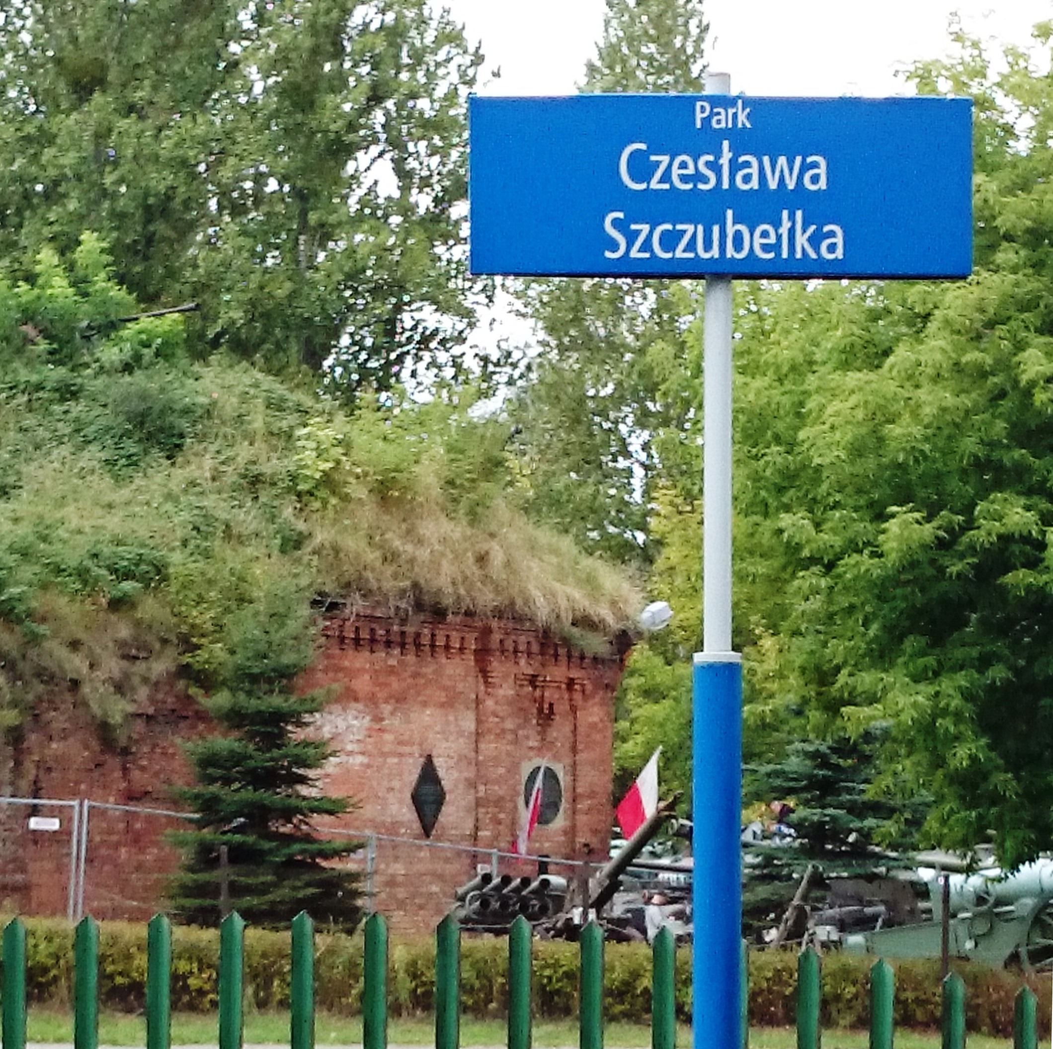 Fort Czerniaków z Parku Czesława Szczubełka po drugiej stronie ul. Powsińskiej w Warszawie